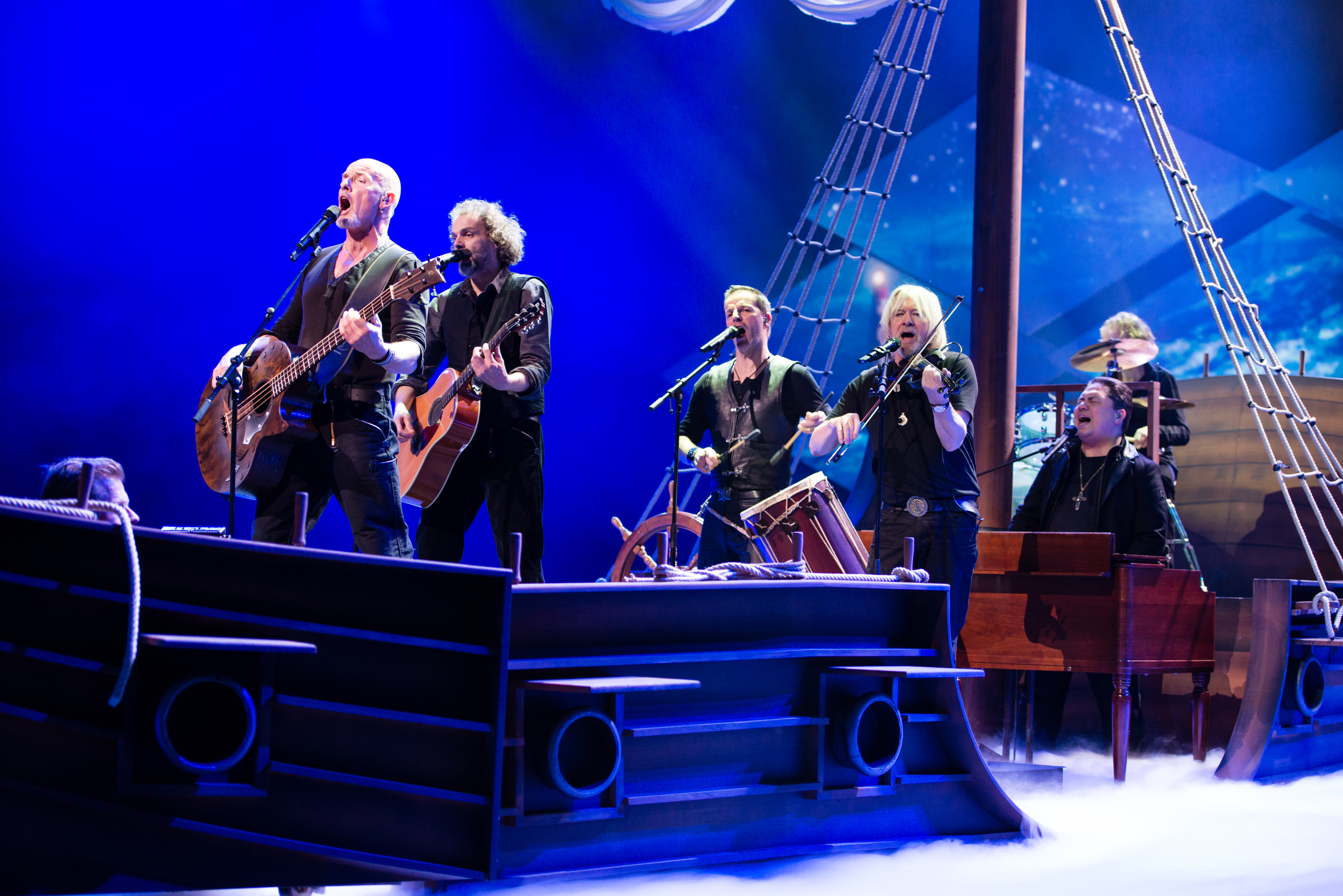 'Eurovision Song Contest 2014 - Unser Song für Dänemark': 'Santiano'